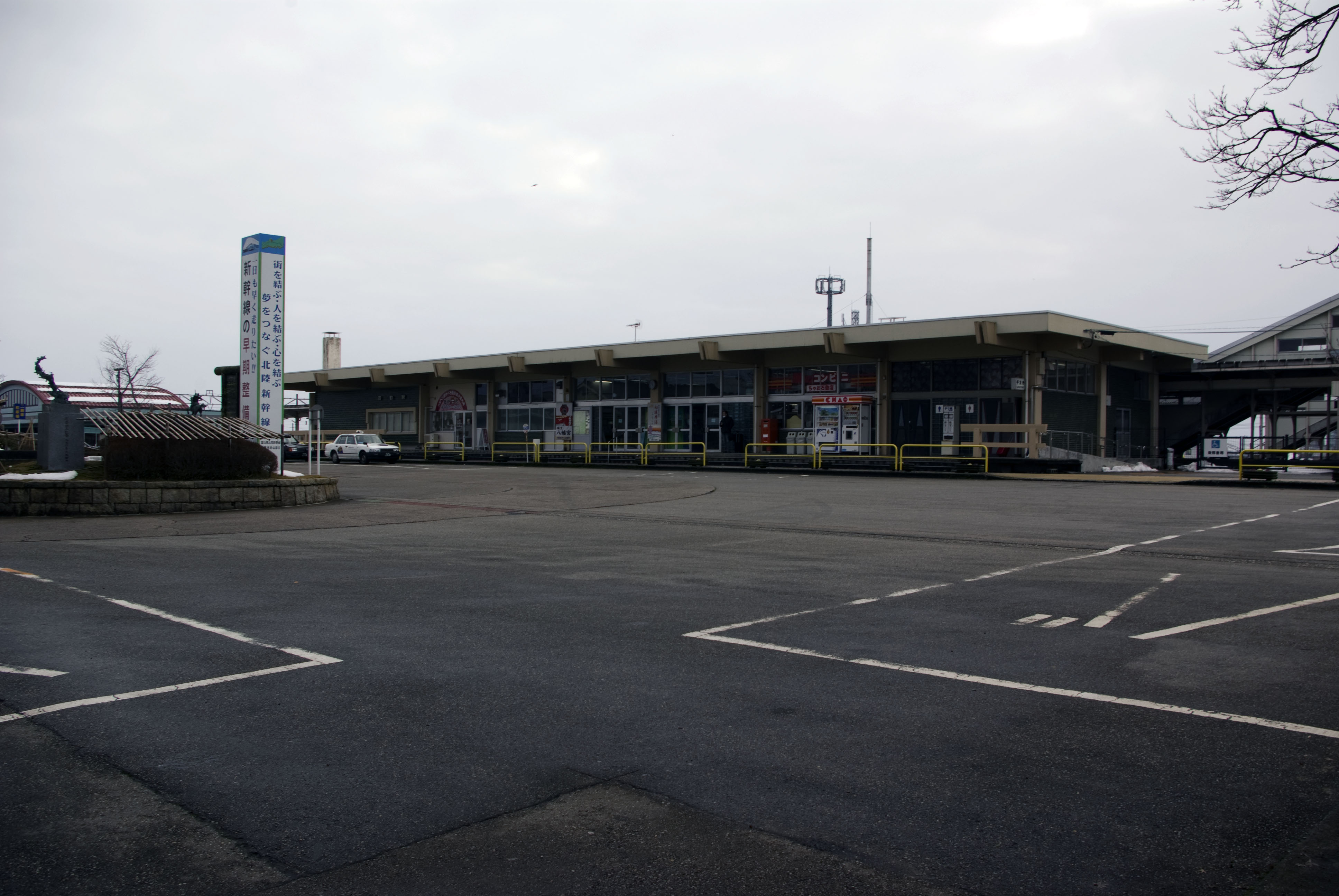 西日本旅客鉄道北陸本線石動駅